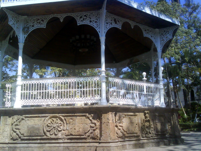 Kiosco de Colima en Jardín Libertad, traído desde Bélgica.